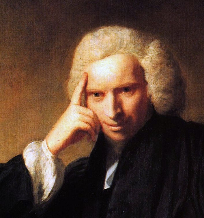 Laurence Sterne